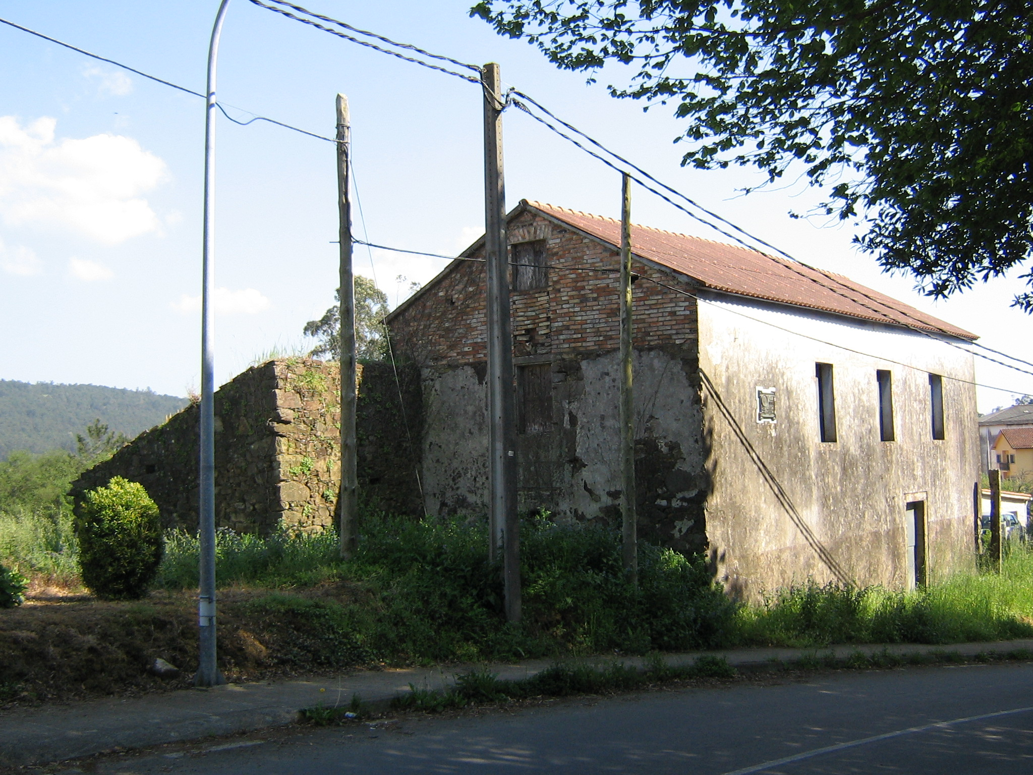 Casa del poeta outiense Francisco Añón Paz.